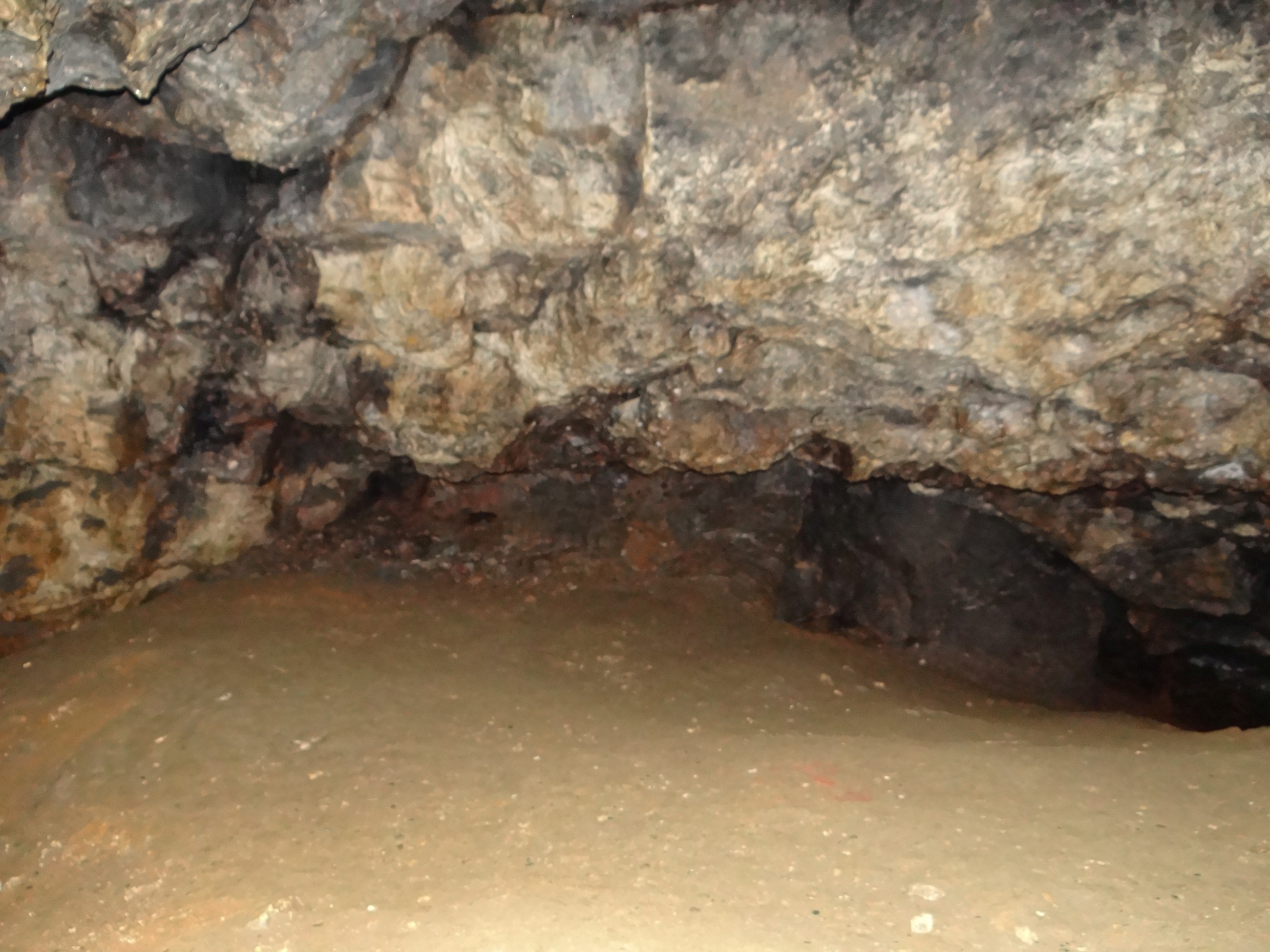 Jaskinia Twardowskiego